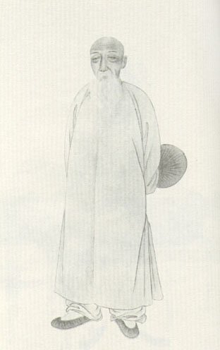 吳熙載，清朝學者。WU Xizai